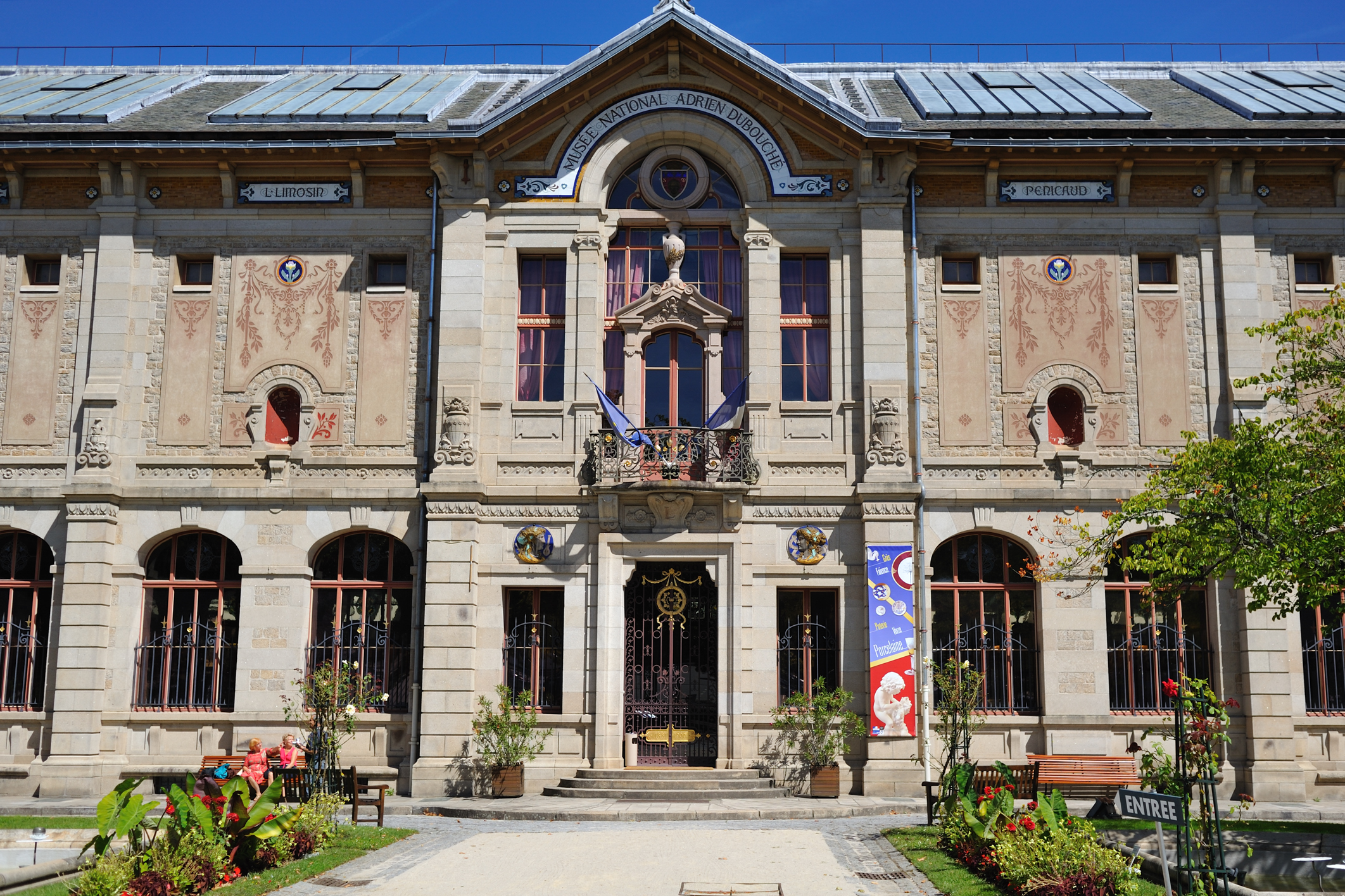 Musée national de la porcelaine Adrien Dubouché, Limoges, Haute-Vienne, France